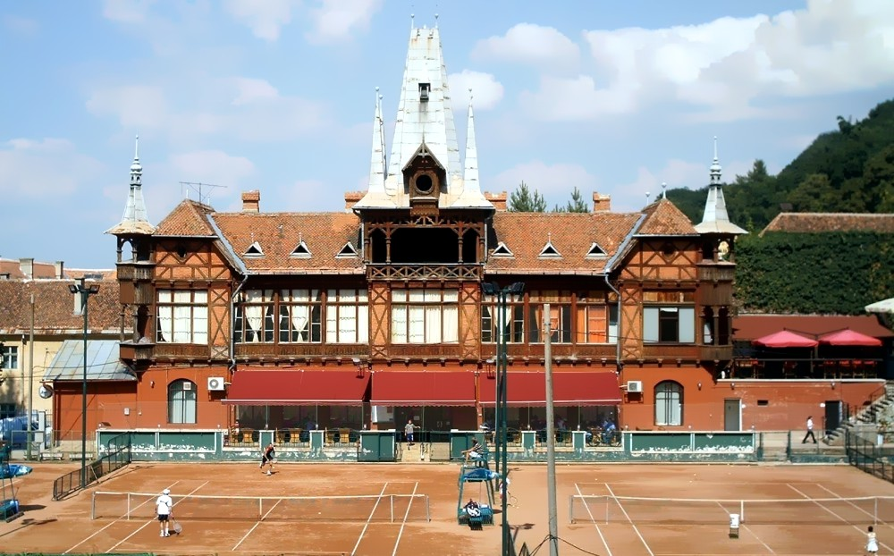 “Olimpia” Building